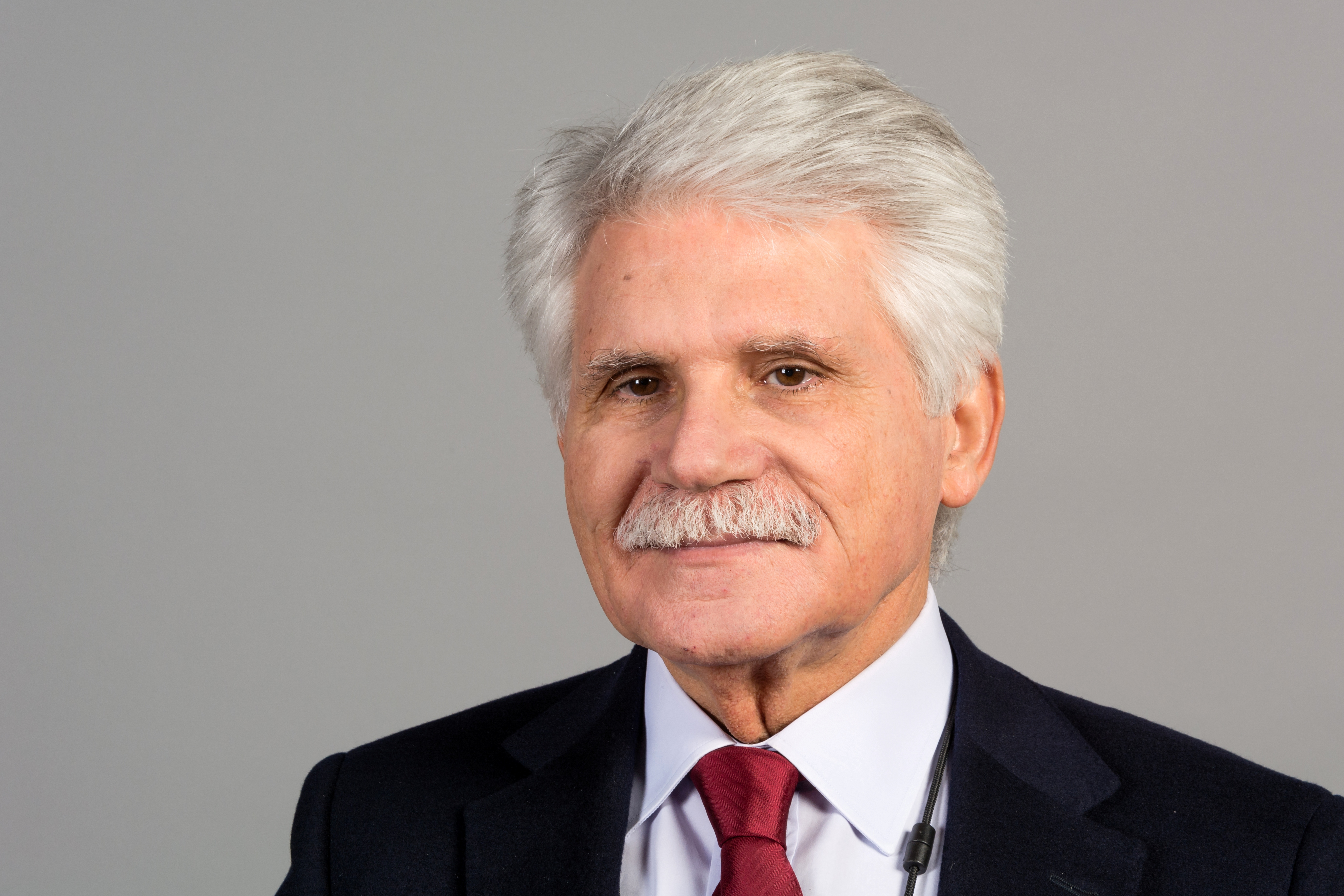 Vital Moreira, Portugal, 2014 Mitglied des Europäischen Parlaments (MEP)